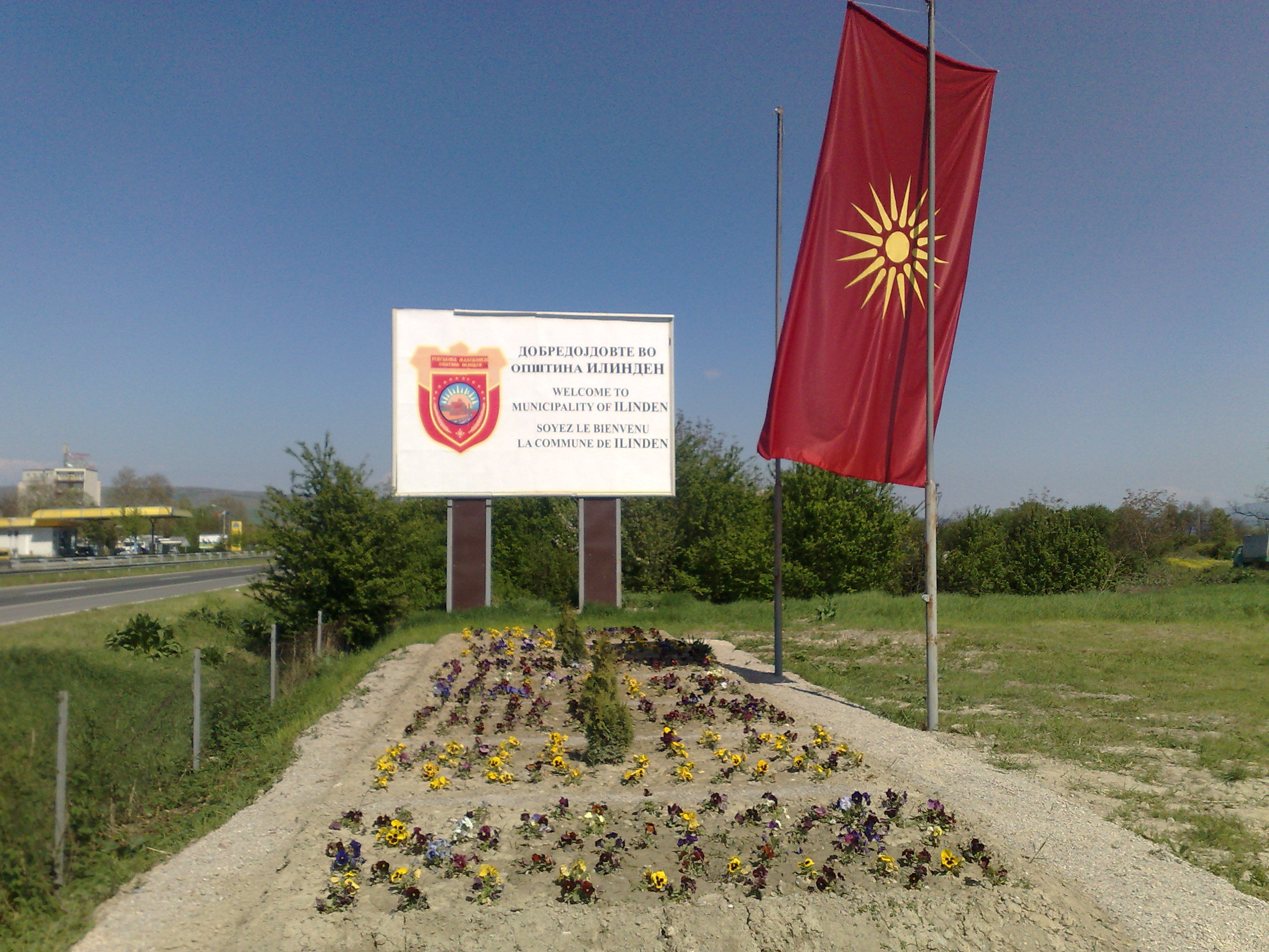 Табла за добредојде на општина Илинден